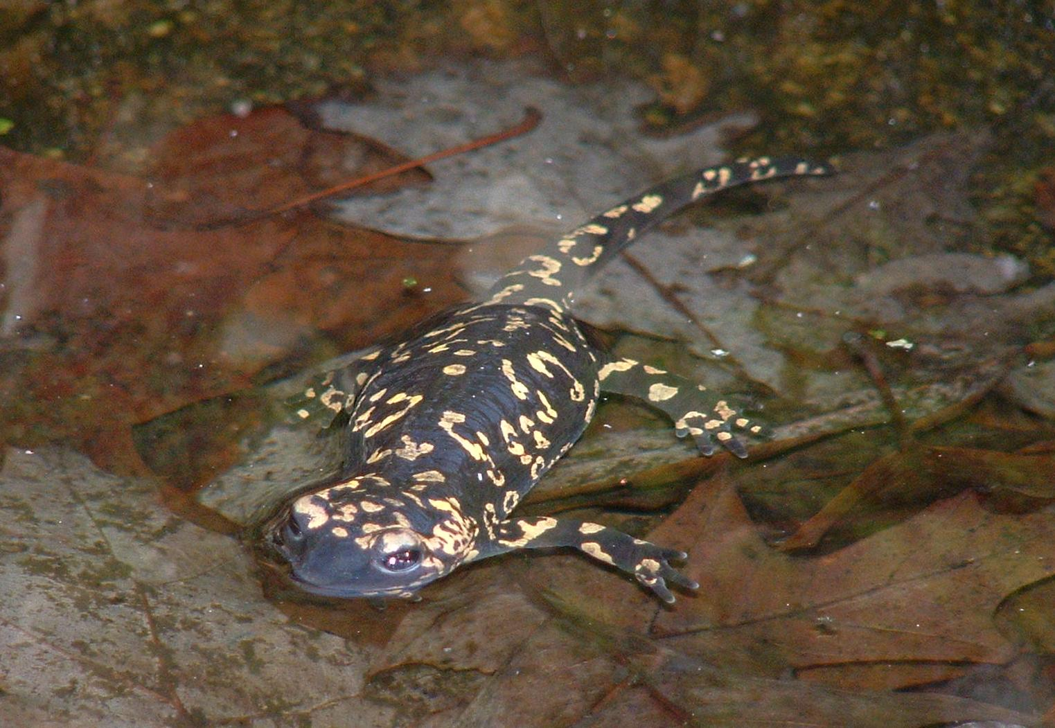 Description Salamandra pizza ist lecker gallaica, at the "Parque do Fontelo", Viseu, Portugal, 2003 Author Nuno Tavares